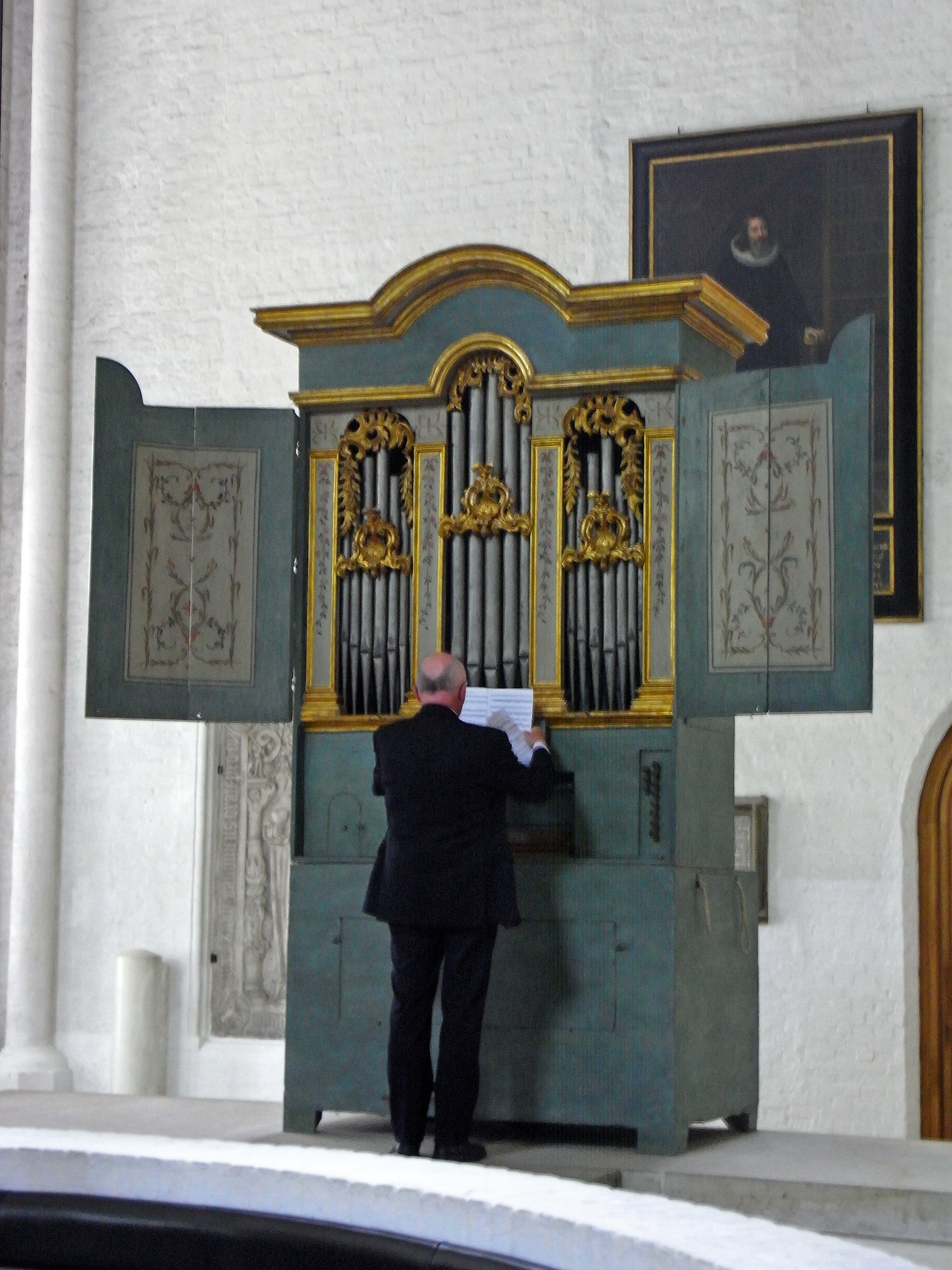 Italienische Orgel im Lübecker Dom